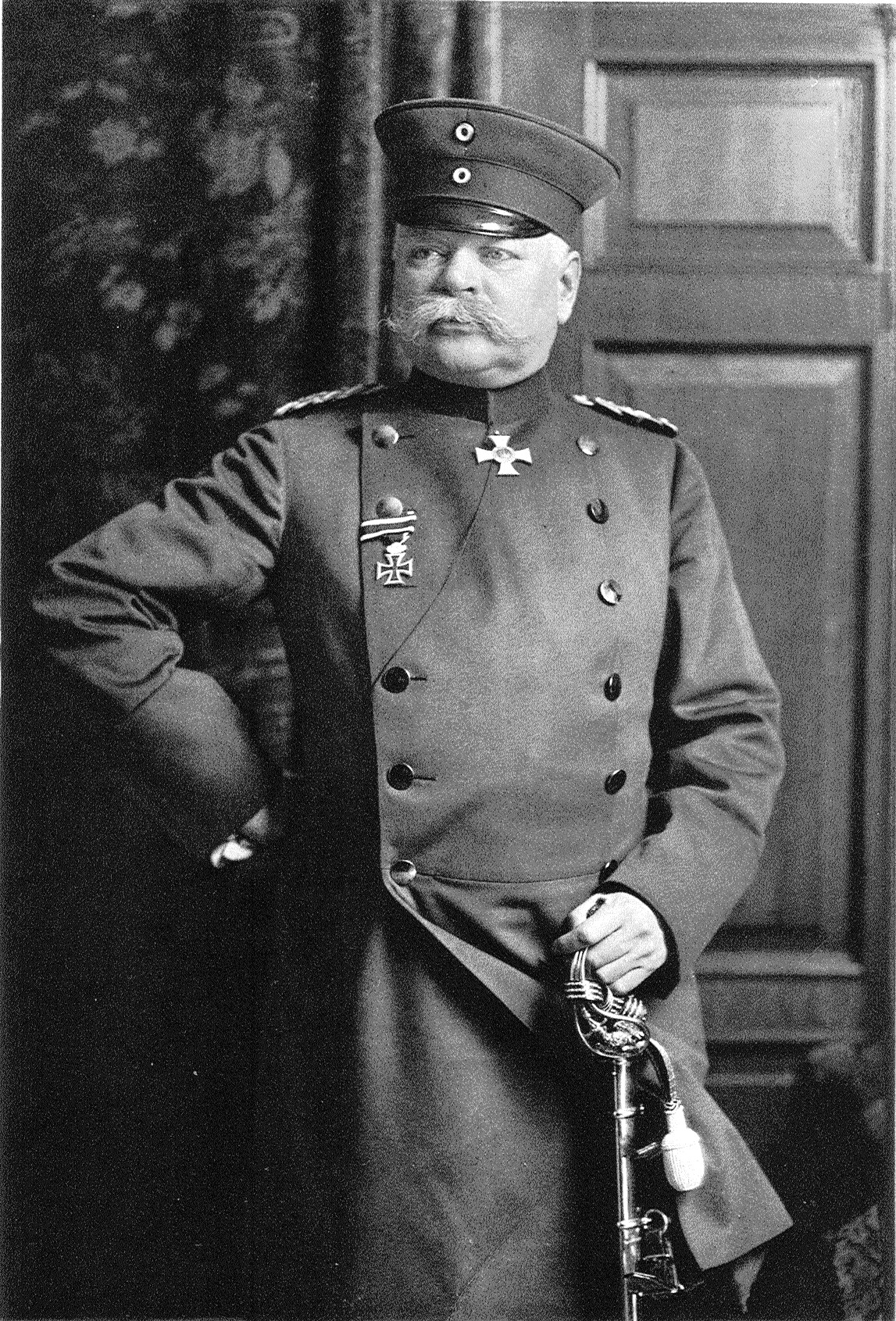 Hanno von Dassel (1850–1918), deutscher Militär, zuletzt Generalleutnant